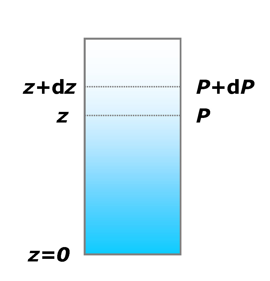 Schema della pressione di una colonna di gas: deduzione classica di Boltzmann delle distribuzioni di velocità per un gas perfetto. Gianluca Spizzo, 13 settembre 2006.